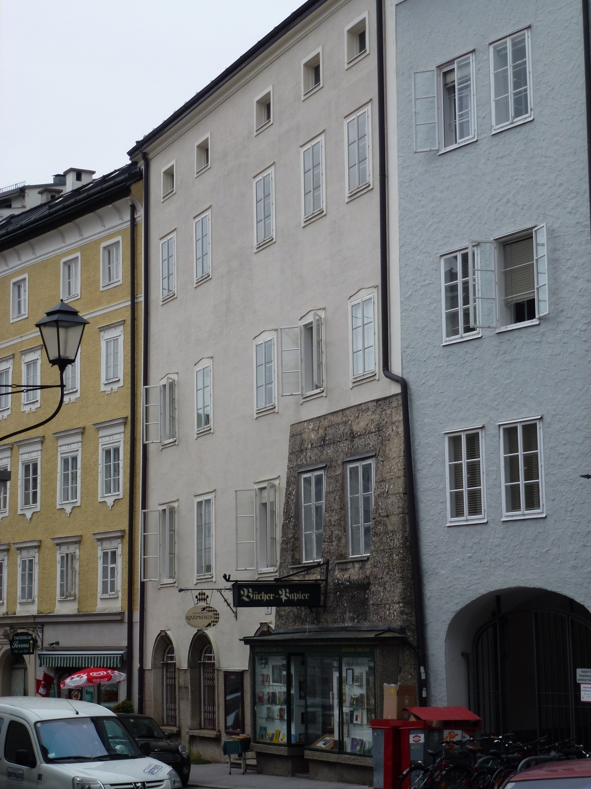 Bürgerhaus, Lodronsches Haus